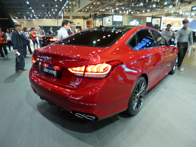 ジェネシス・G80